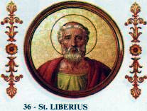 Pope Liberius